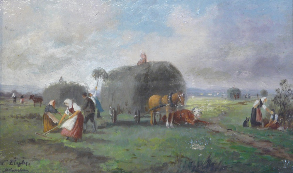 Bei der Heuernte.